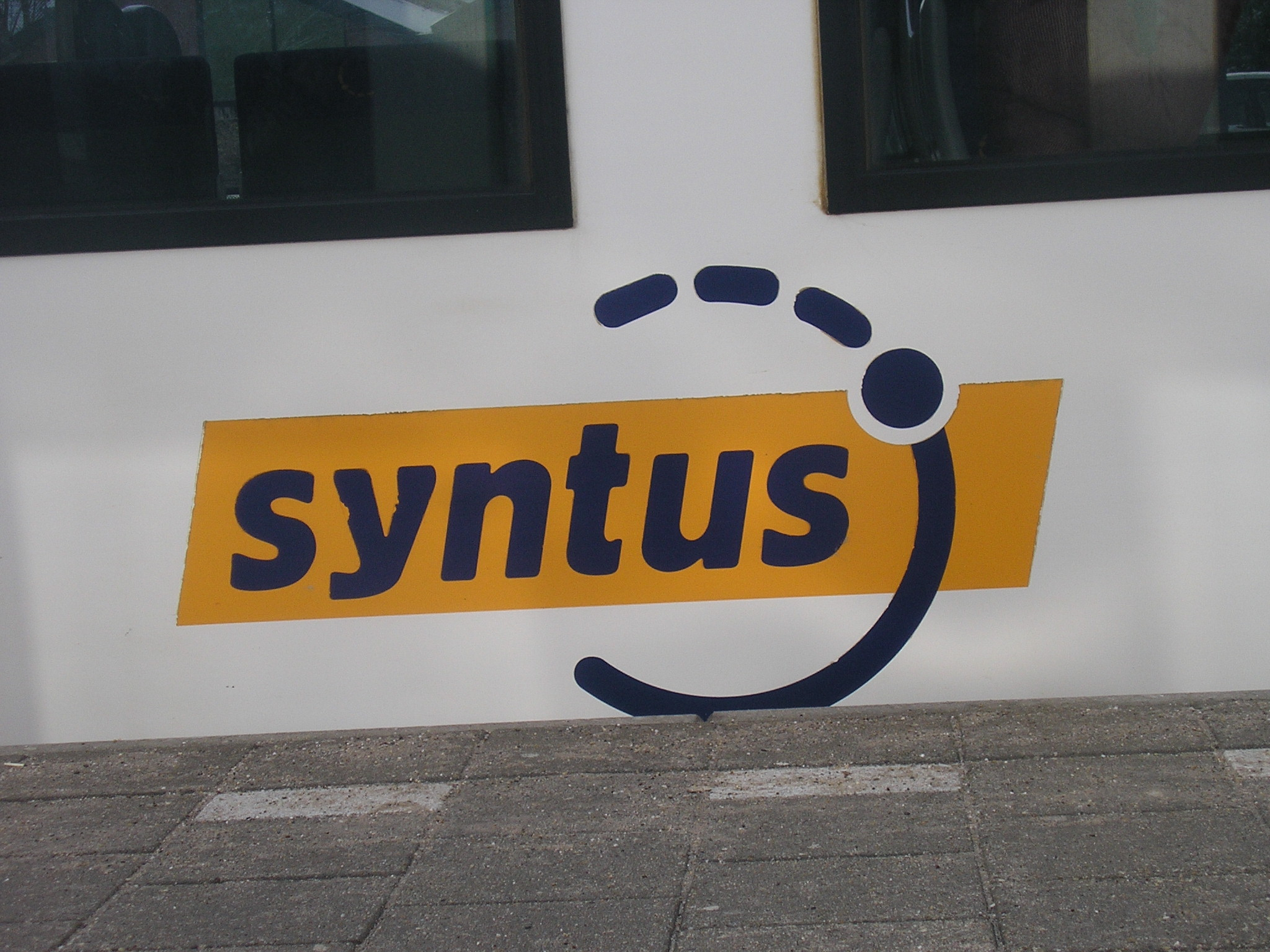 Het Logo van Syntus op een van hun Lint Treinen Categorie:Afbeelding Nederlands spoorwegmaterieel